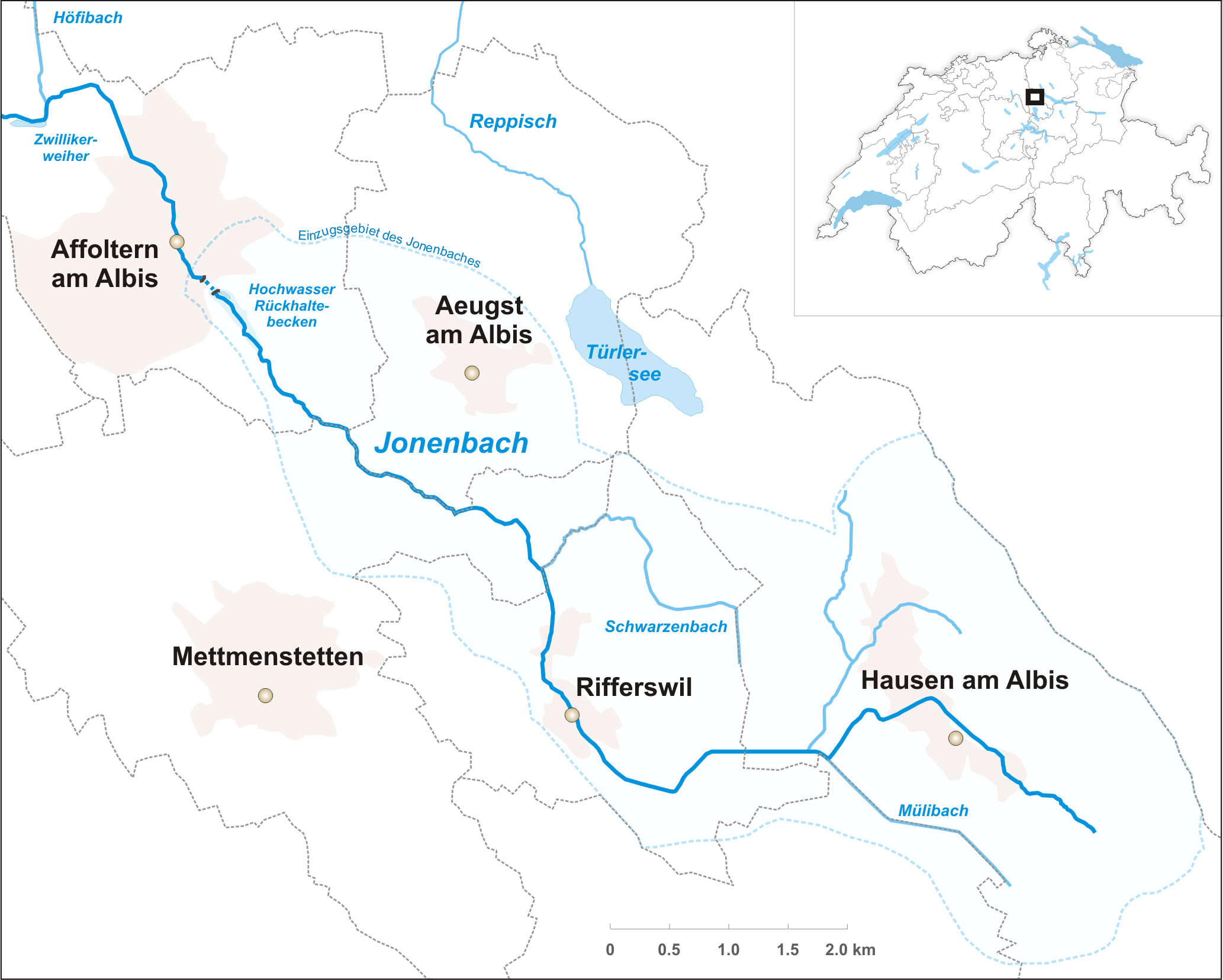 Description: Rückhaltebecken Jonenbach Designer: Tschubby